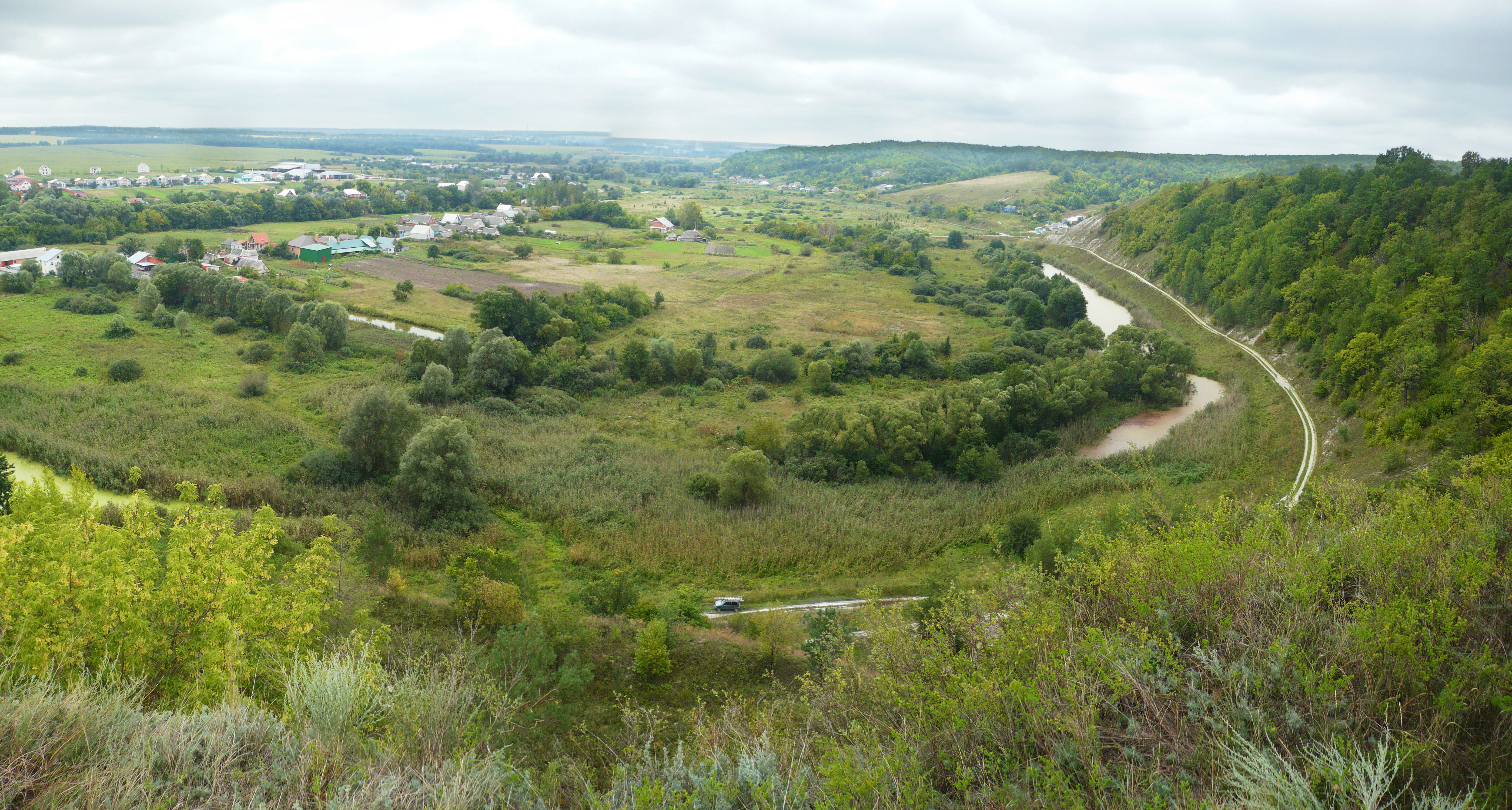 Дмитриевское городище. Вид на юго-восточную окраину посада. 2012.